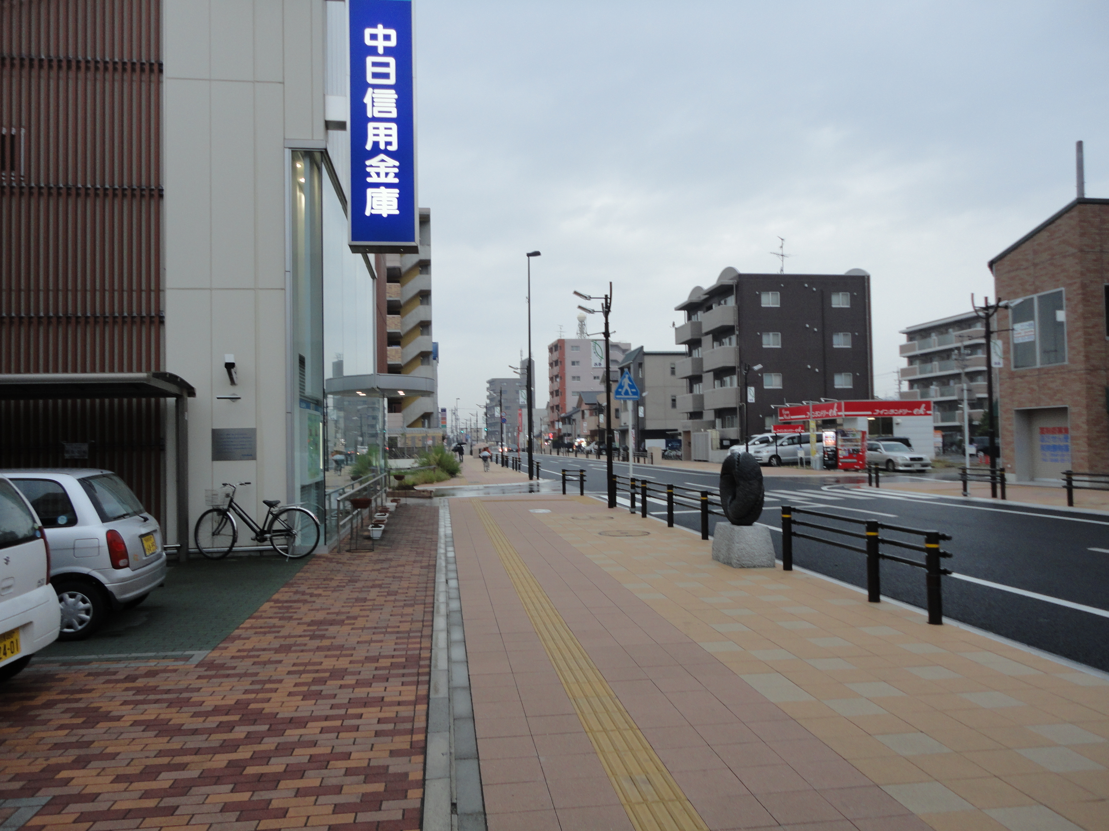 西春